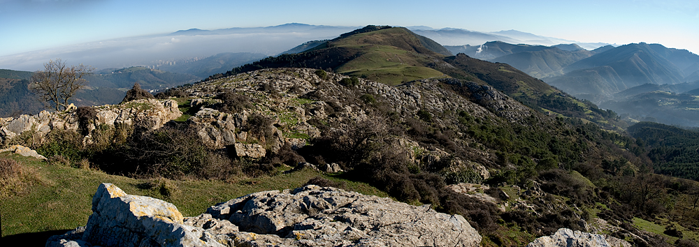 Sasiburu Atxurietatik ikusita, esluinaldean dagoena Pagasarri ingurua da eta atzekaldean dagoena Loiu. 3 argazkien panoramika huginekin lotuta (gora soft librea). Barakaldo (Bizkaia)